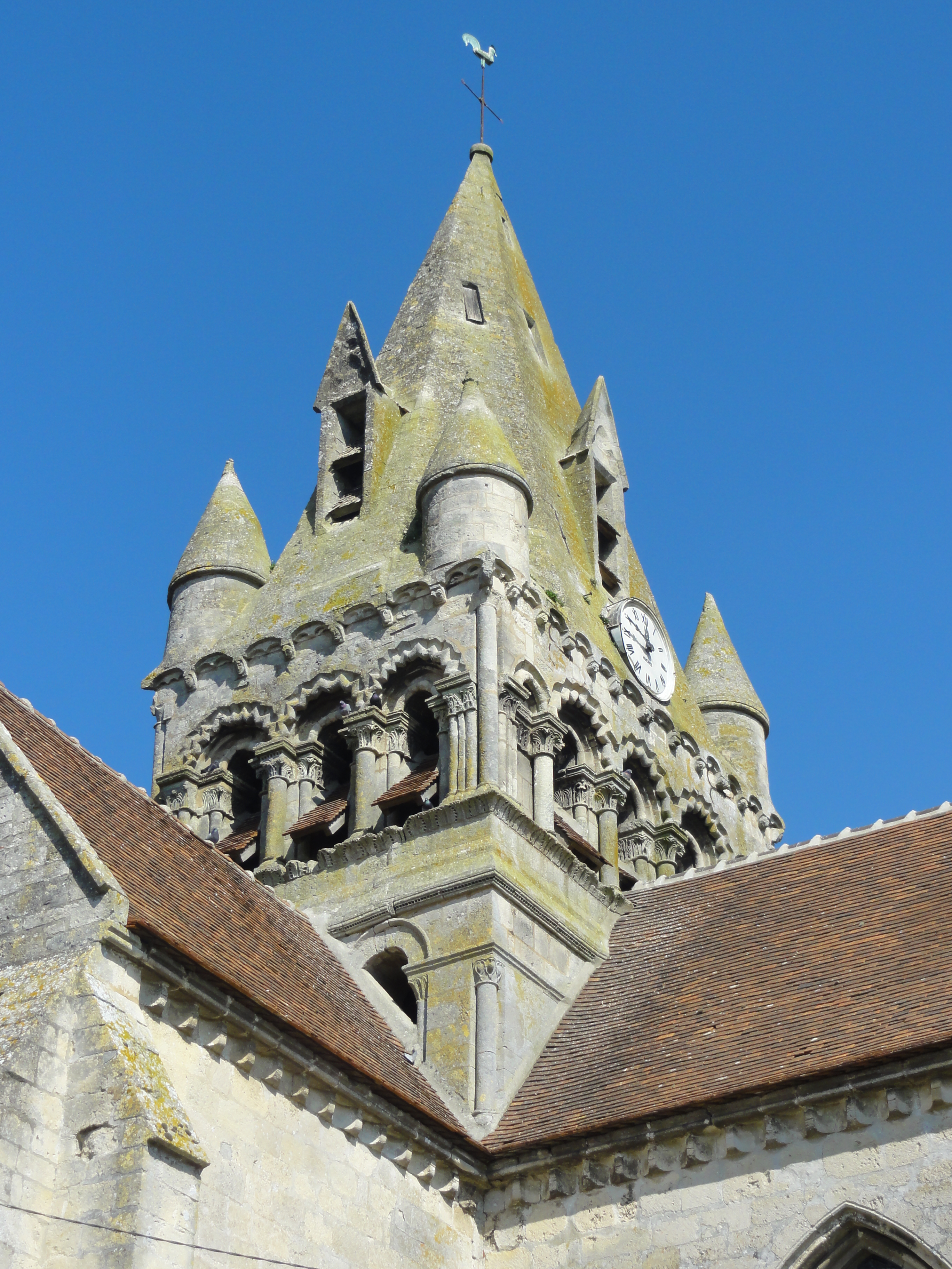 Clocher, vue depuis le sud-est.